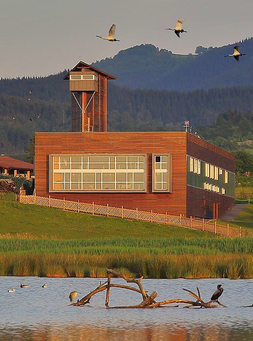 Edificio Urdaibai Bird Center, frente al humedal .